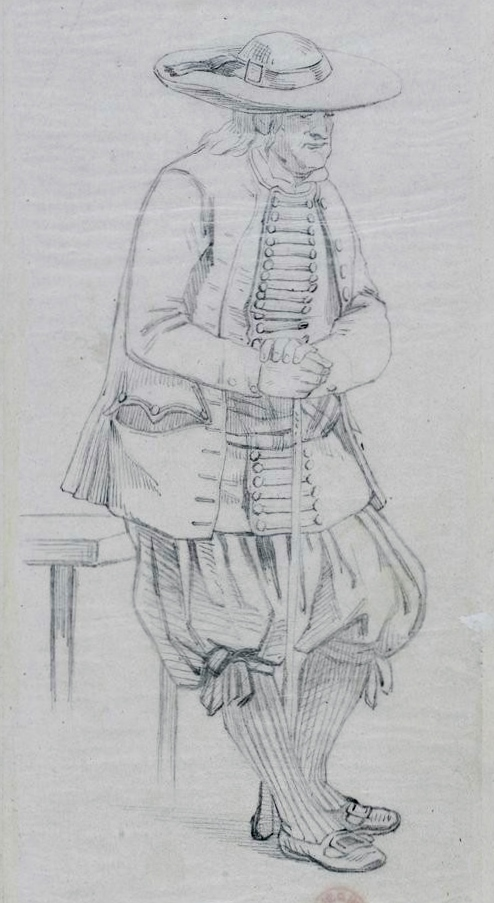 Homme de Landivisiau (dessin anonyme, 1849). L'auteur a indiqué : "Kergariou, collecteur de tailles".